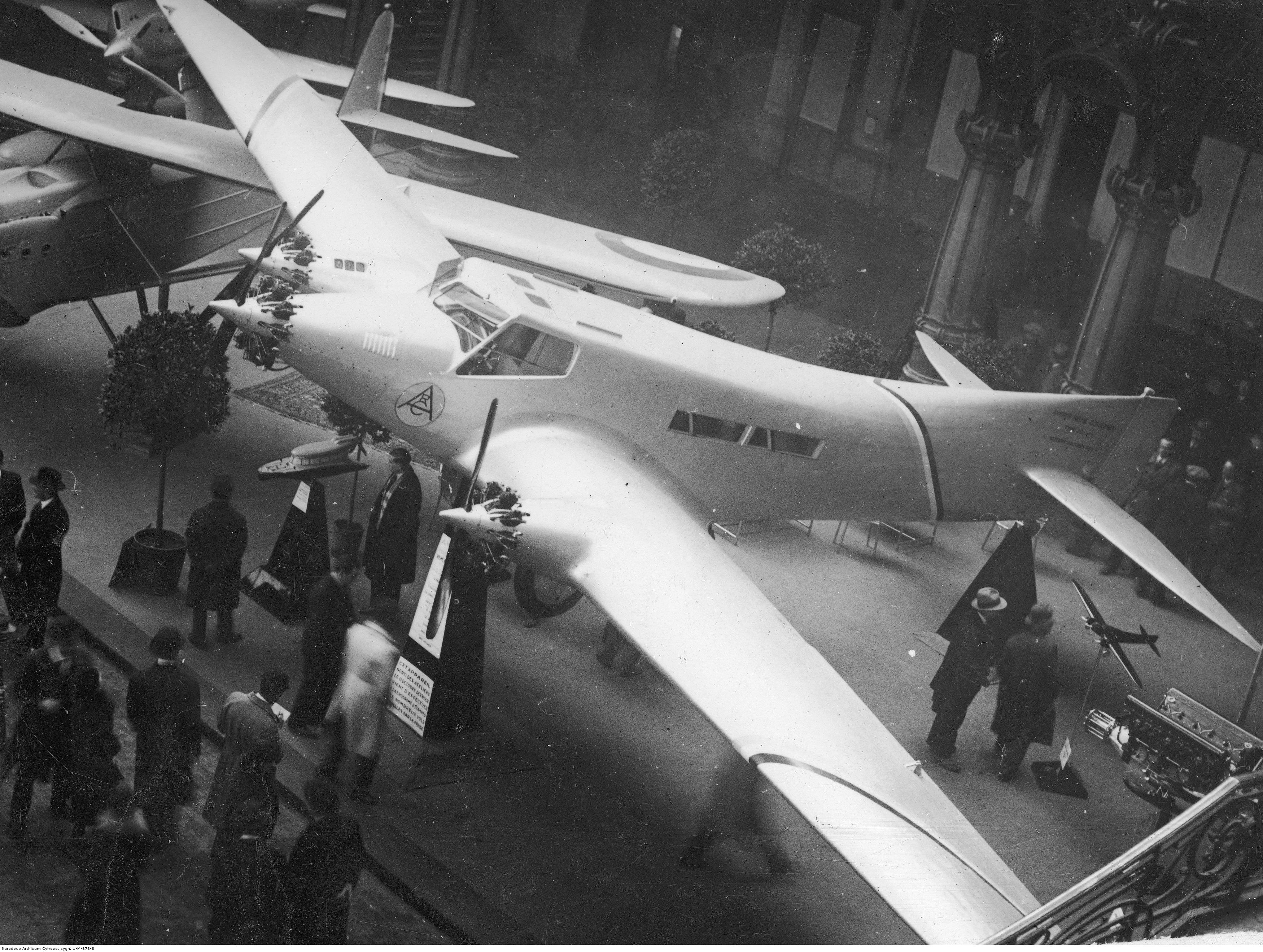 Samolot Couzinet 30 eksponowany na Międzynarodowym Salonie Lotniczym w Grand Palais w Paryżu.